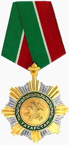 Орден За заслуги перед Республикой Татарстан